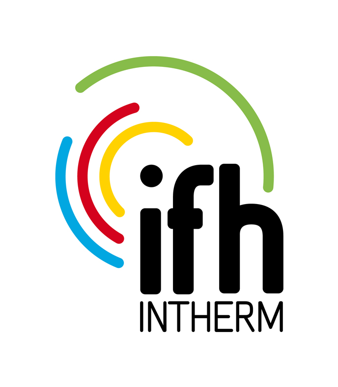 Logo IFH/Intherm 2014